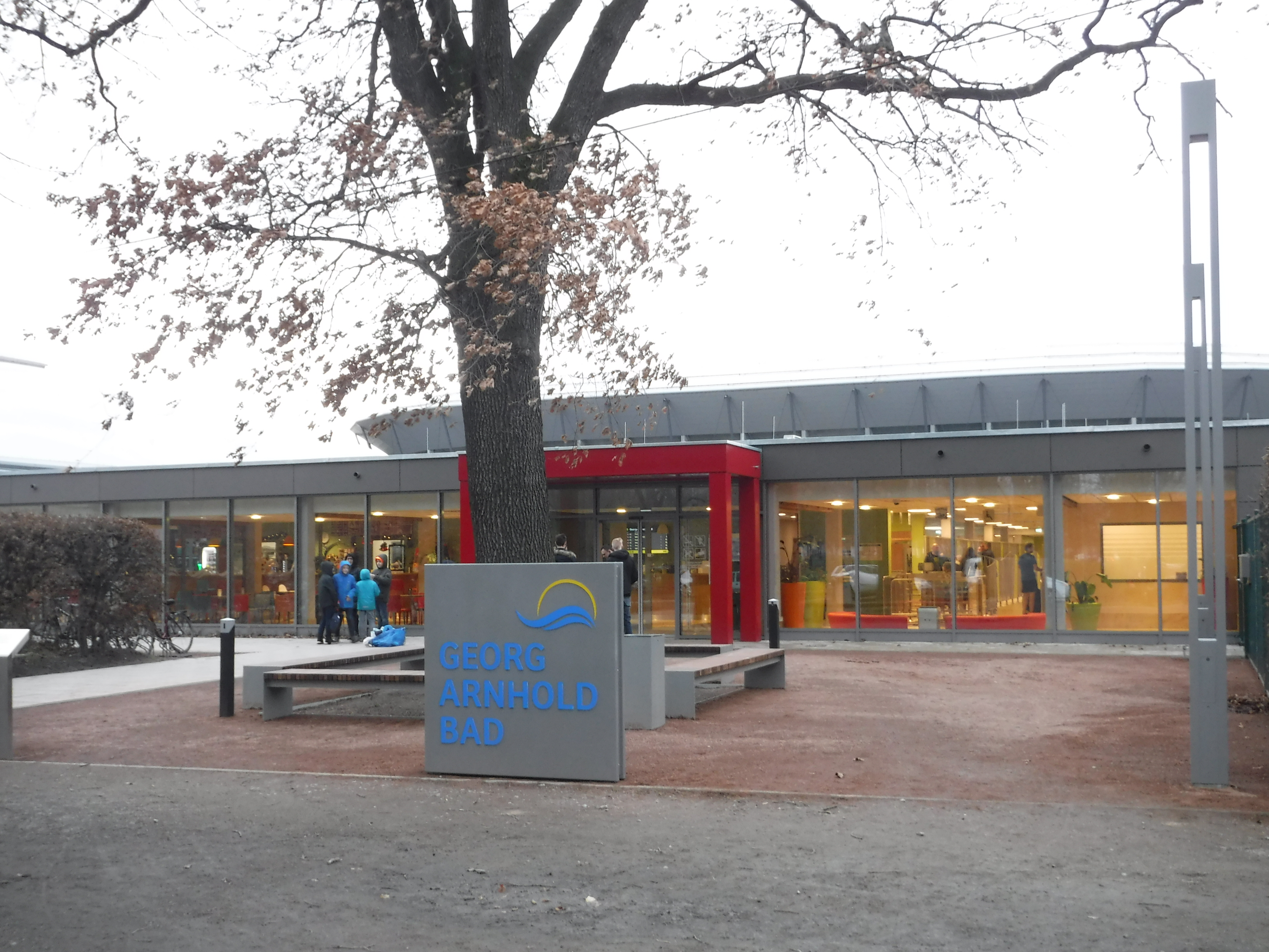 Georg-Arnhold-Bad, Dresden - Haupteingang